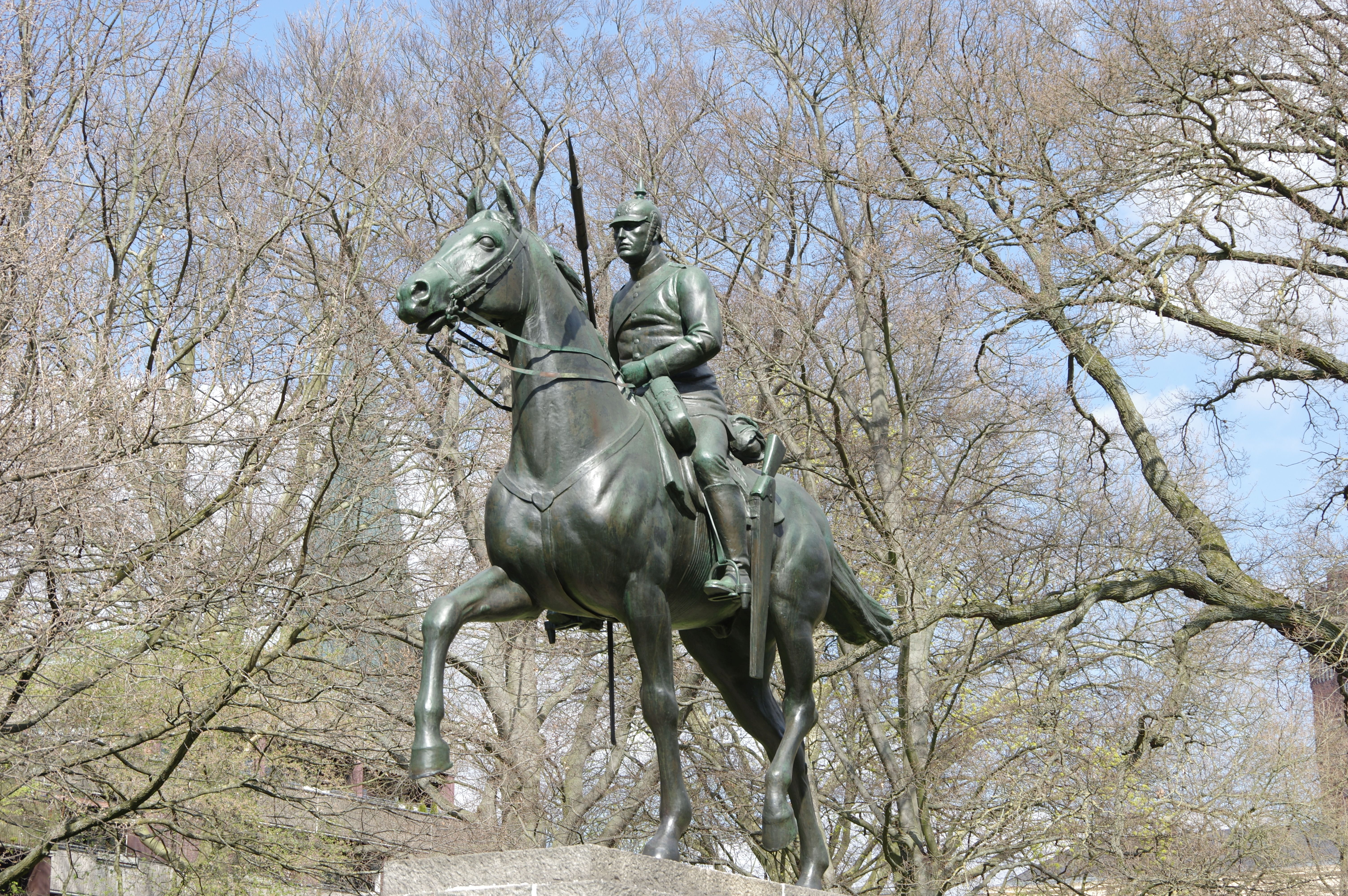 Lüneburg in Niedersachsen. Der Clamart-Park ist ein Park südöstlich der Lüneburger Altstadt. Der Park wurde nach der französischen Partnerstadt Clamart benannt.